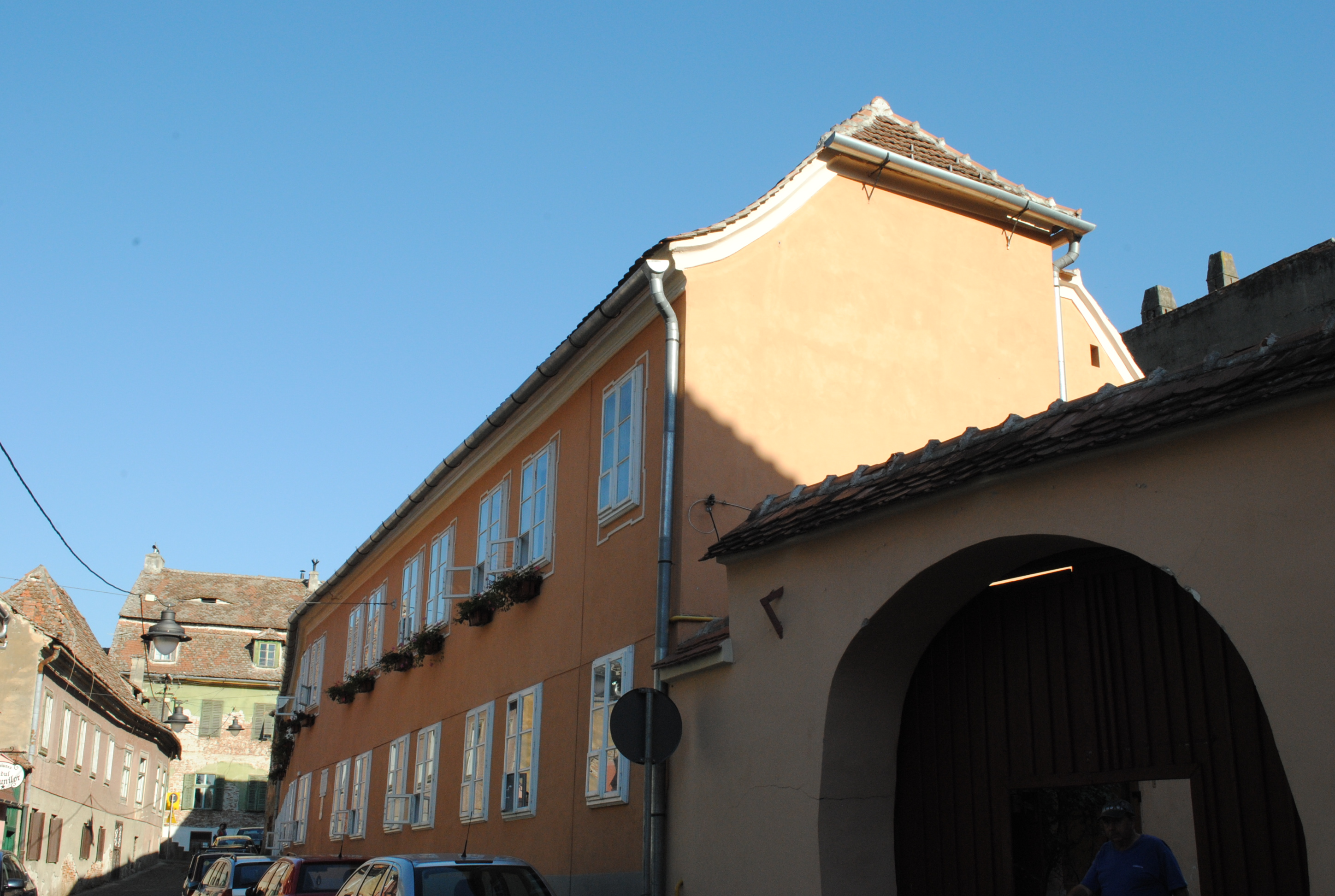 Azilul (multiple corpuri), 1292 - 1760 01